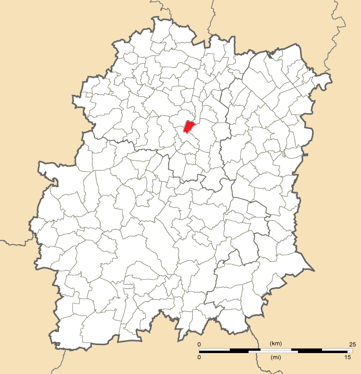 Carte de position de Leuville-sur-Orge en Essonne (91)